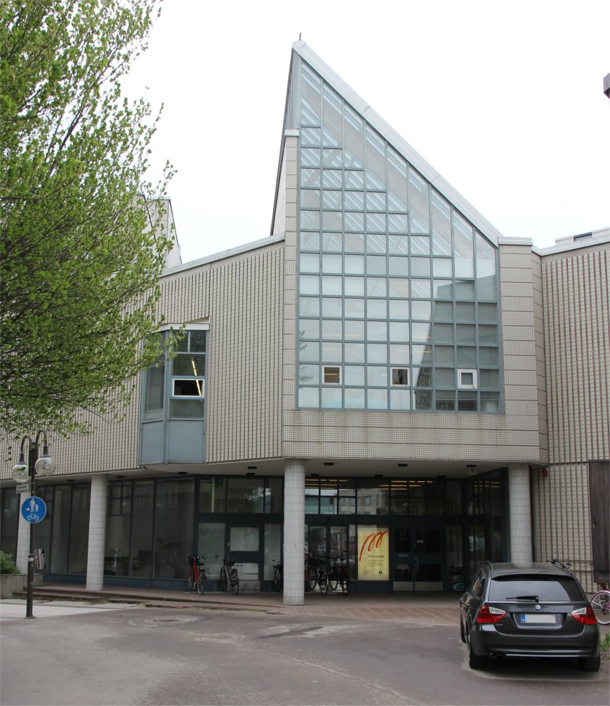 Ammattikorkeakoulu Metropolian Tikkurilan toimipisteen sisäänkäynti. Rakennus sijaitsee Laurea-ammattikorkeakoulun Tikkurilan toimipisteen ja Tikkurilan pääkirjaston naapurina lähellä Tikkurilan rautatieasemaa.